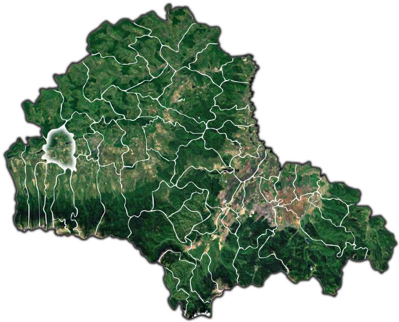 Voila jud Brasov